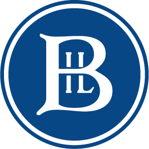 Brønnøysund IL logo